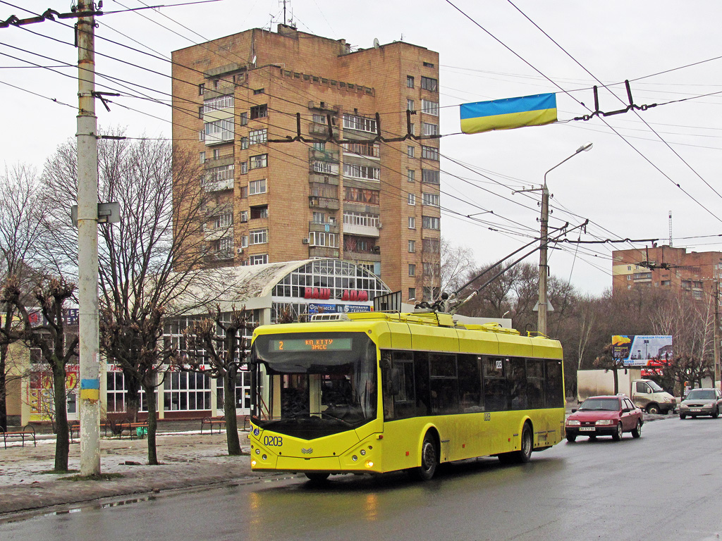 Краматорский троллейбус